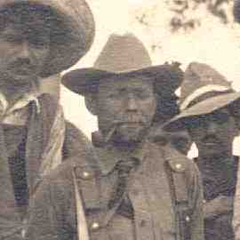 Capitán James Charles Bulger en México durante la Revolución Mexicana